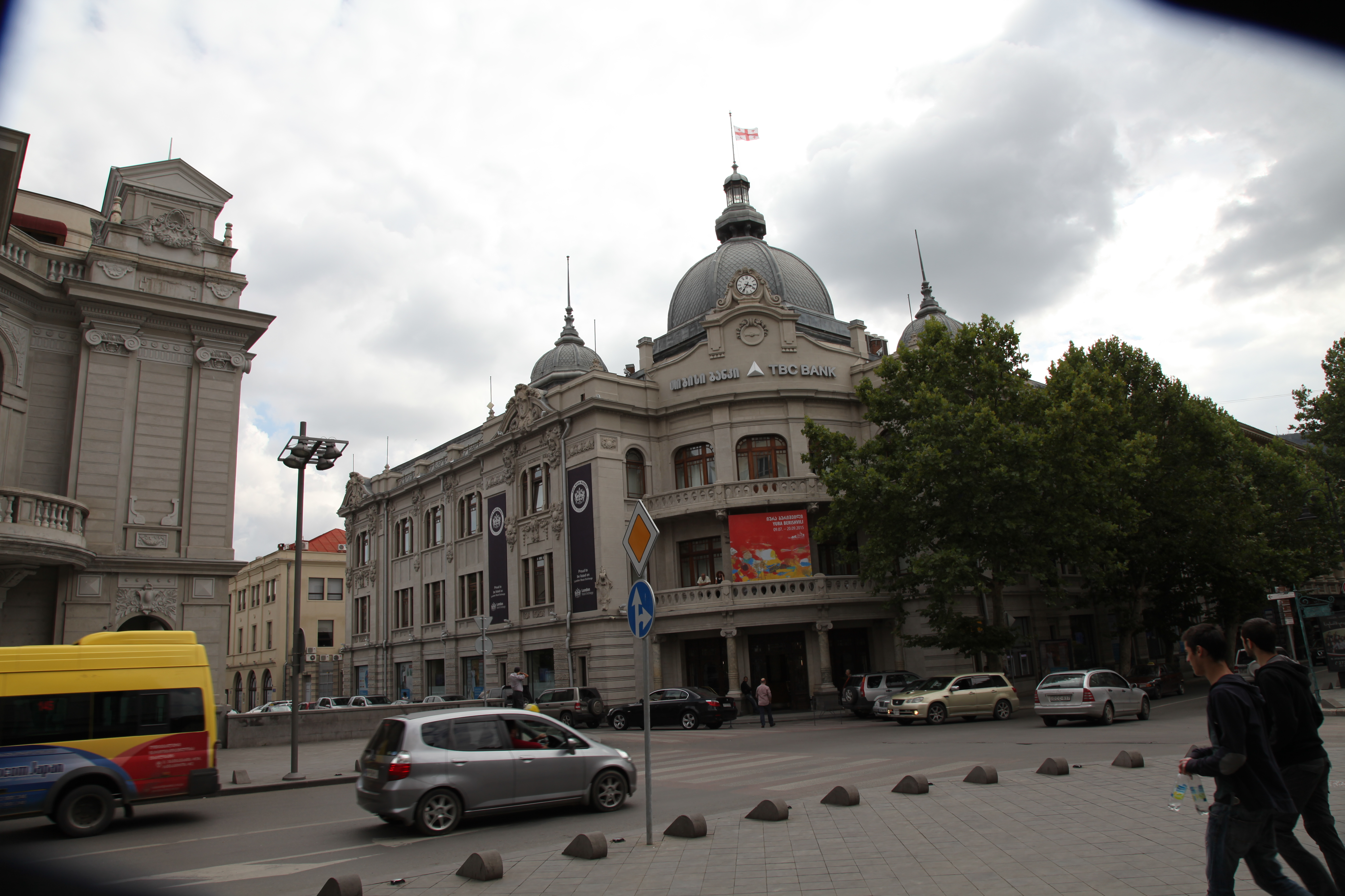 The making of this document was supported by Wikimedia Polska. To zdjęcie zostało wykonane podczas Wikiwyprawy 2015. Wszystkie zdjęcia z wyprawy możesz zobaczyć w kategorii: Wikiwyprawa 2015. English | polski | +/− To zdjęcie zostało załadowane dzięki współpracy z firmą Hyperbook. polski | +/− To zdjęcie zostało załadowane dzięki współpracy z firmą: Kopex Group. English | polski | +/−